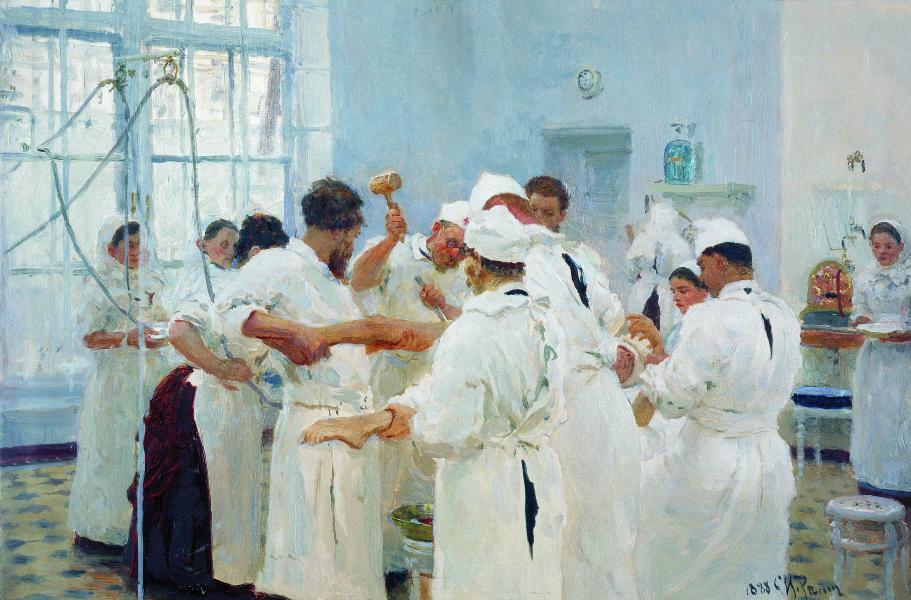 Илья Ефимович писал его портрет и посвятил ему картину «Хирург Е.В.Павлов на операции». Картина эта возникла не случайно. Ученица Репина, М.В. Веревкина, сломала руку и лечилась в клинике Павлова. Репин навещал свою больную ученицу. Кроме того, в больнице под наблюдением Павлова одно время находилась жена Ильи Ефимовича, Вера Алексеевна. Она болела печенью, и ей предстояла операция. (воспоминания о Репине)